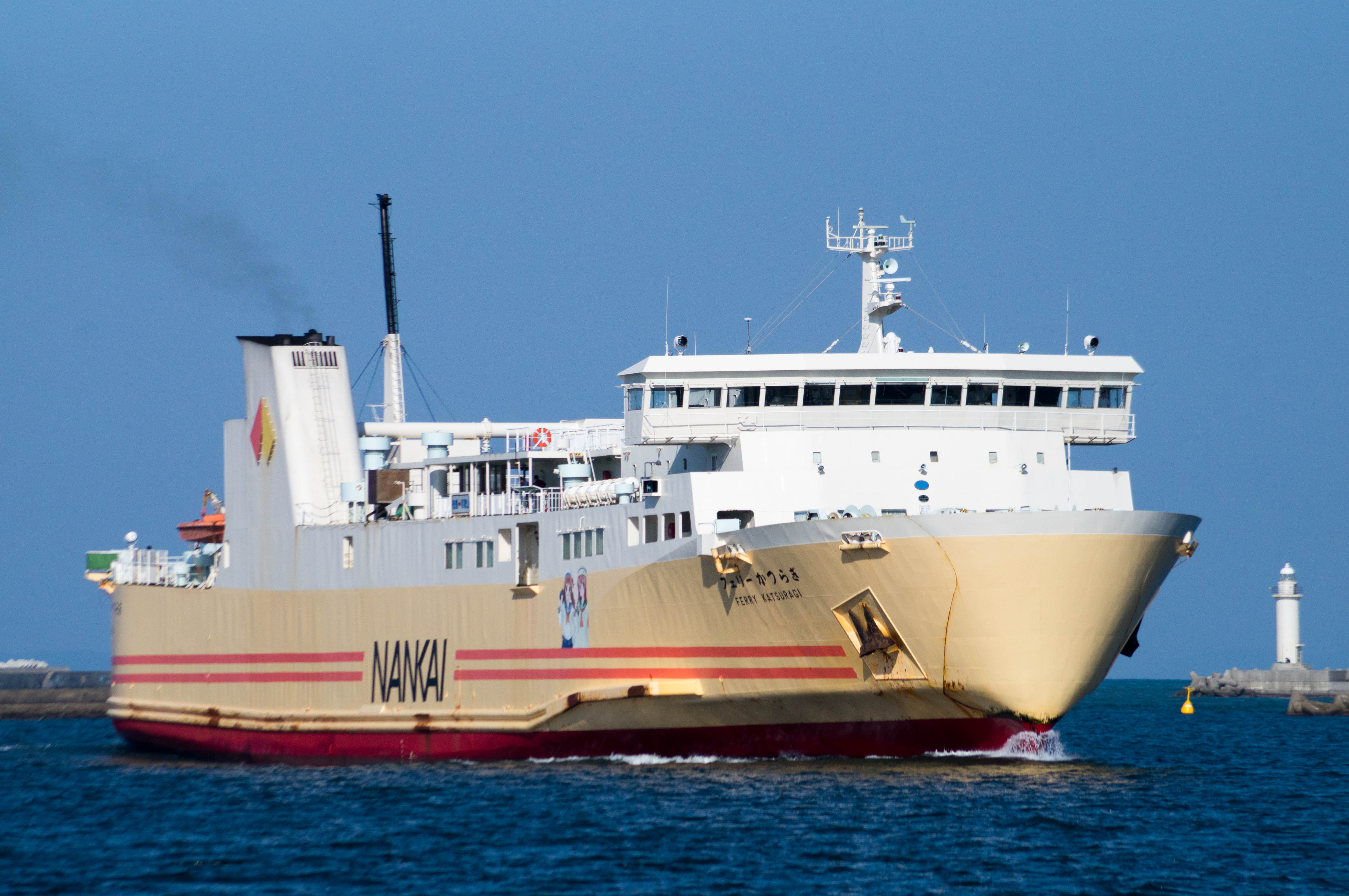 南海フェリー「フェリーかつらぎ」（2016年5月4日、和歌山港）